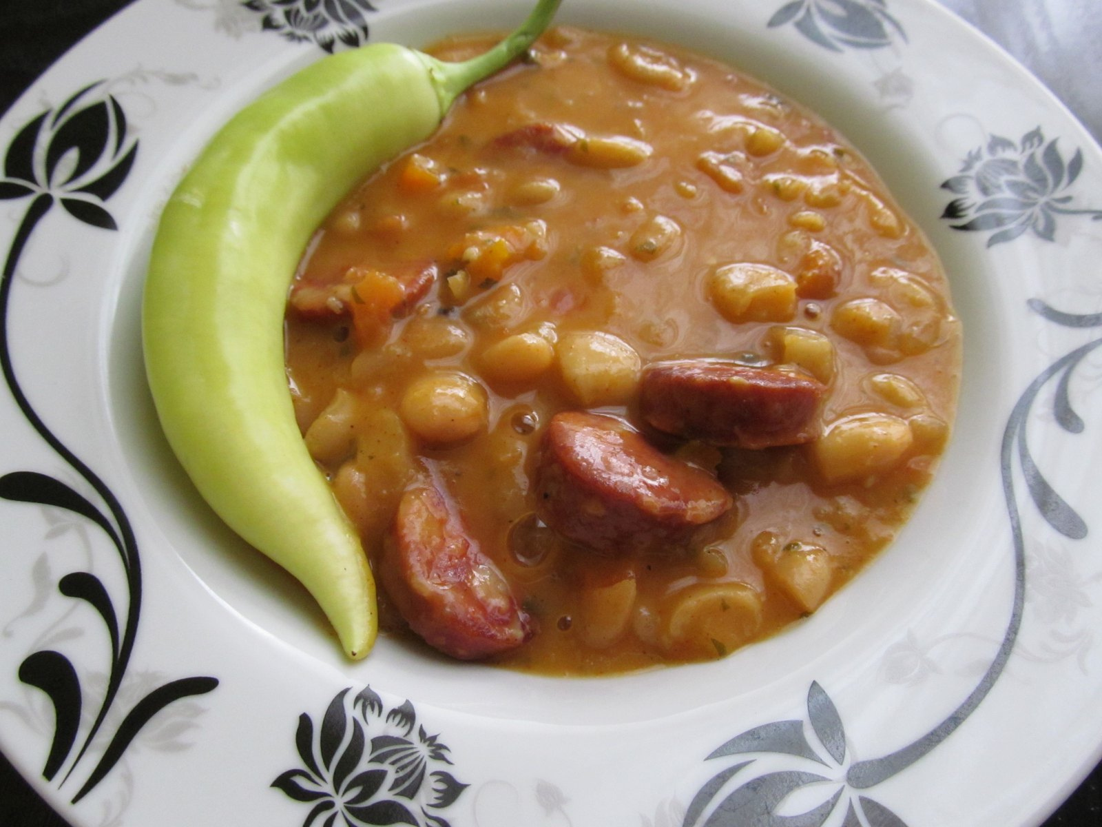 Domaći pasulj po isprobanom receptu pasulj